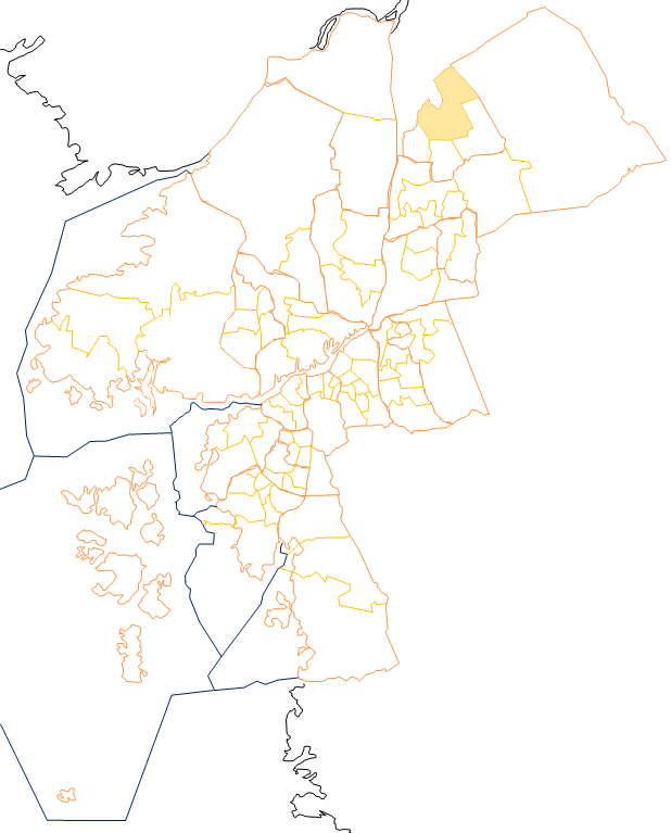 Karta som visar primärområdes belägenhet i Göteborg